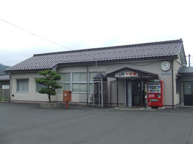 JR十村駅の駅舎